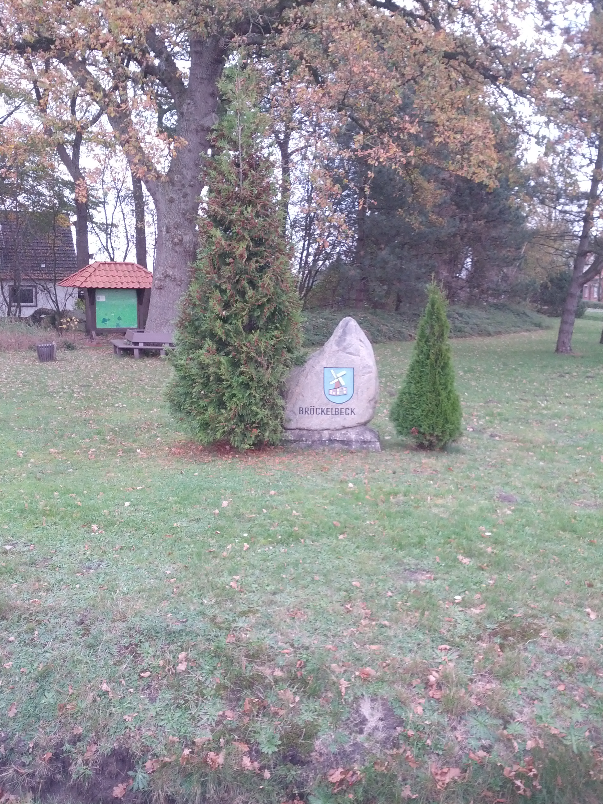 Wapensteen in Bröckelbeek